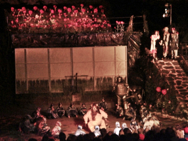 Der Zauberer von OZ in 2005